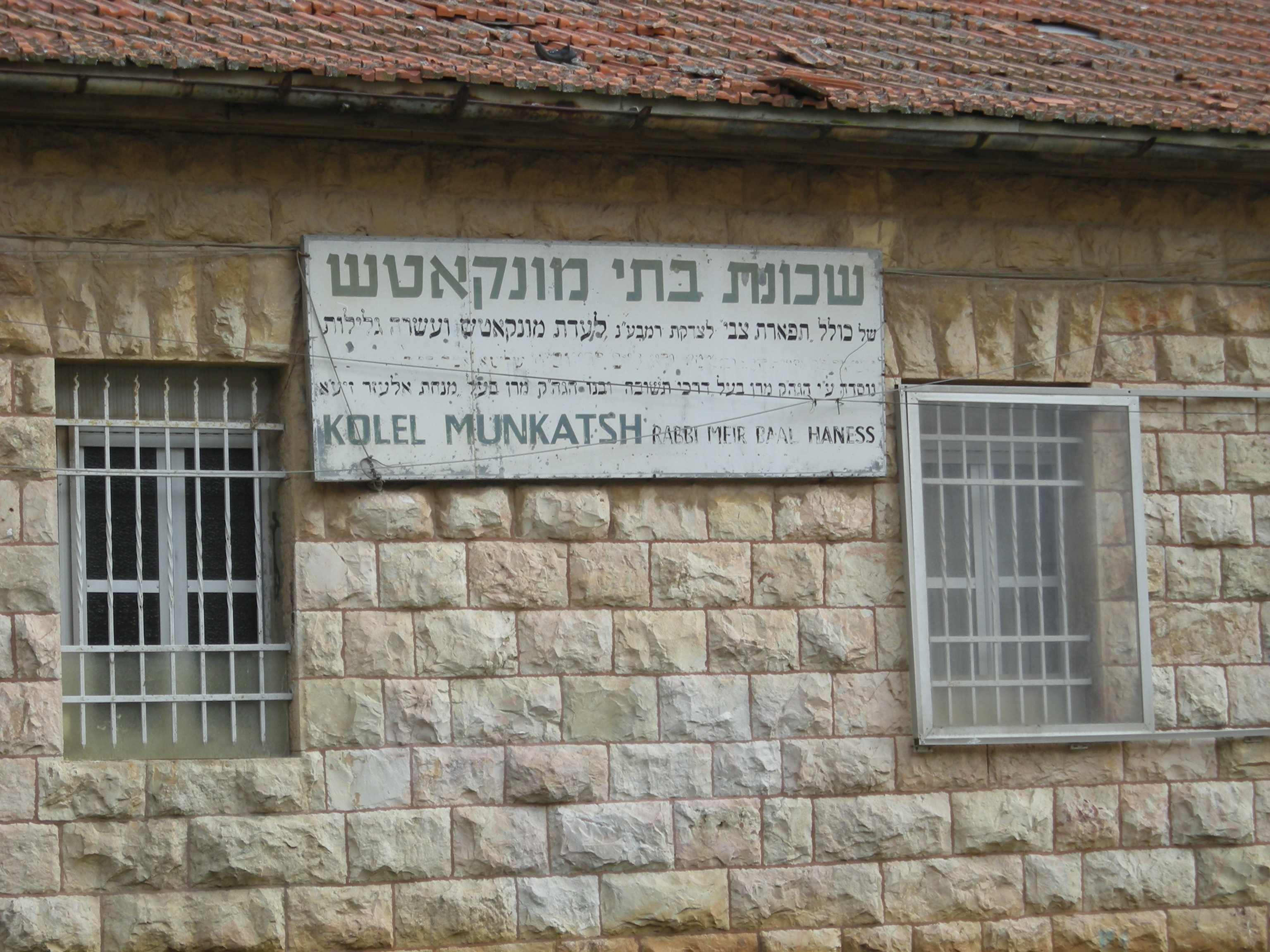 Batei Munkatsh in Jerusalem